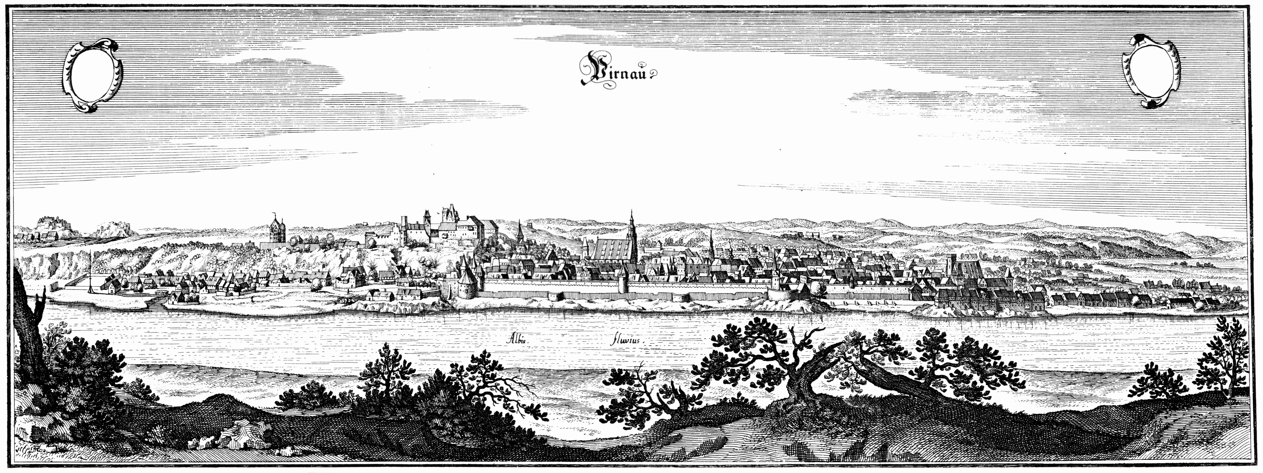 Kupferstich 10,5 x 31,5cm von Matthäus Merian um 1650. Das Bild zeigt die städtebauliche Situation der in der Zeit zwischen 1605 und 1639, erkennbar an dem achteckigen turmartigen Lusthaus östlich von Schloss Sonnenstein, welches 1605 erbaut und im Dreißigjährigen Krieg 1639 zerstört/abgetragen wurde.